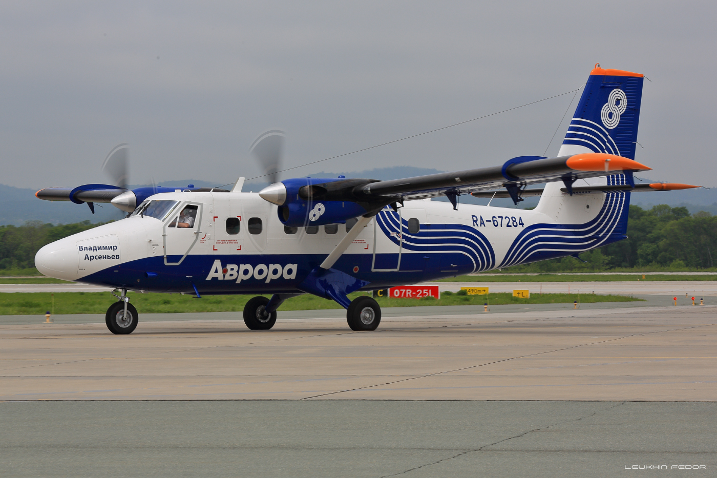 Aurora DHC-6-400